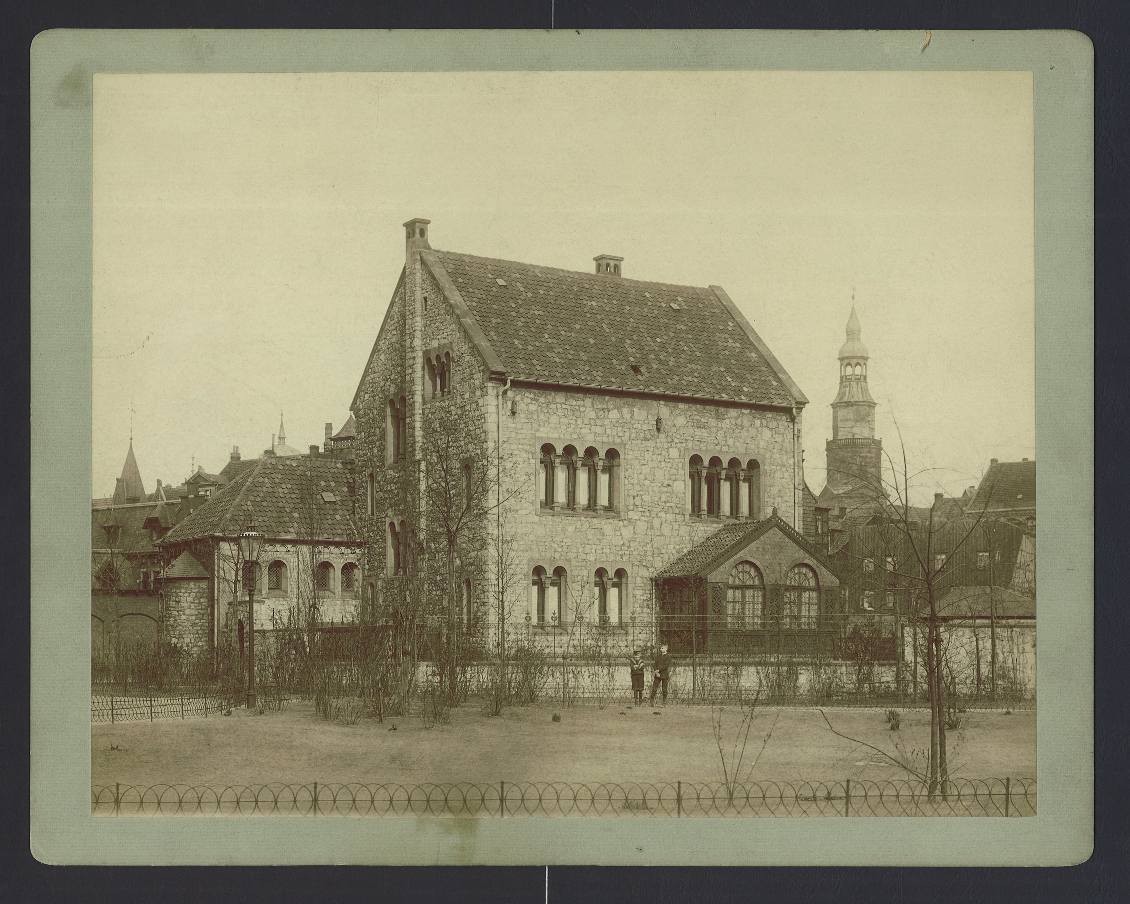 Bis zur Klärung mit den hannoverschen Institutionen (Historisches Museum, Stadtarchiv, Reformierte Kirche...) zur Zeit noch ohne Gewähr: Vermutlich das ehemalige Kirch- und Pfarrhaus der Französisch-reformierten Kirche in Hannover auf dem Dreieck Brandstraße, Ecke Wagenerstraße und Mittelstraße. Im Hintergrund rechts die Neustädter Kirche, im Hintergrund links die runde Kuppel der (seinerzeit) Neuen Synagoge an der Bergstraße (durch die Nazis in der "Reichspogromnacht" 1938 verbrannt und einen Tag später abgerissen). Innerhalb des umzäunten Wiesenbereiches ("Betreten verboten!") im Vordergrund ist links von dem neugepflanzten Baum bereits ein Gullydeckel zu sehen, der möglicherweise noch im heutigen Verlauf der Brandstraße zu finden ist. Die beiden Buben vor der Kirchenmauer dürften mit Absicht von dem Fotografen im Bild platziert worden sein. Am Standpunkt des damaligen (derzeit noch unbekannten) Fotografen dürften heute eine Nachkriegsbebauung vorhanden sein, dies läßt sich vermutlich erst nach exakter Geokoordinierung nachweisen. Anstelle der beiden Gebäude in der Mitte des Fotos befindet sich heute die Kindertagesstätte "..." der Evangelischen Landeskirche Hannover. Der Fotoabzug auf Albuminpapier ist auf dickerem blaugräulichem Karton montiert, Kartonmaße circa 30,45 cm x 23,9 cm. Auf der Rückseite ein handschriftlicher Vermerk (vermutlich jüngeren Datums) mit Bleistift: "Hannover, 1890". Möglicherweise reiche ich später nochmal einen höher aufgelösten Scan nach. Weitere Forschungsergebnisse sowie der Übertrag in die Erweiterte Realität dürften folgen (dafür an dieser Stelle die Stiftung dieses Scans).